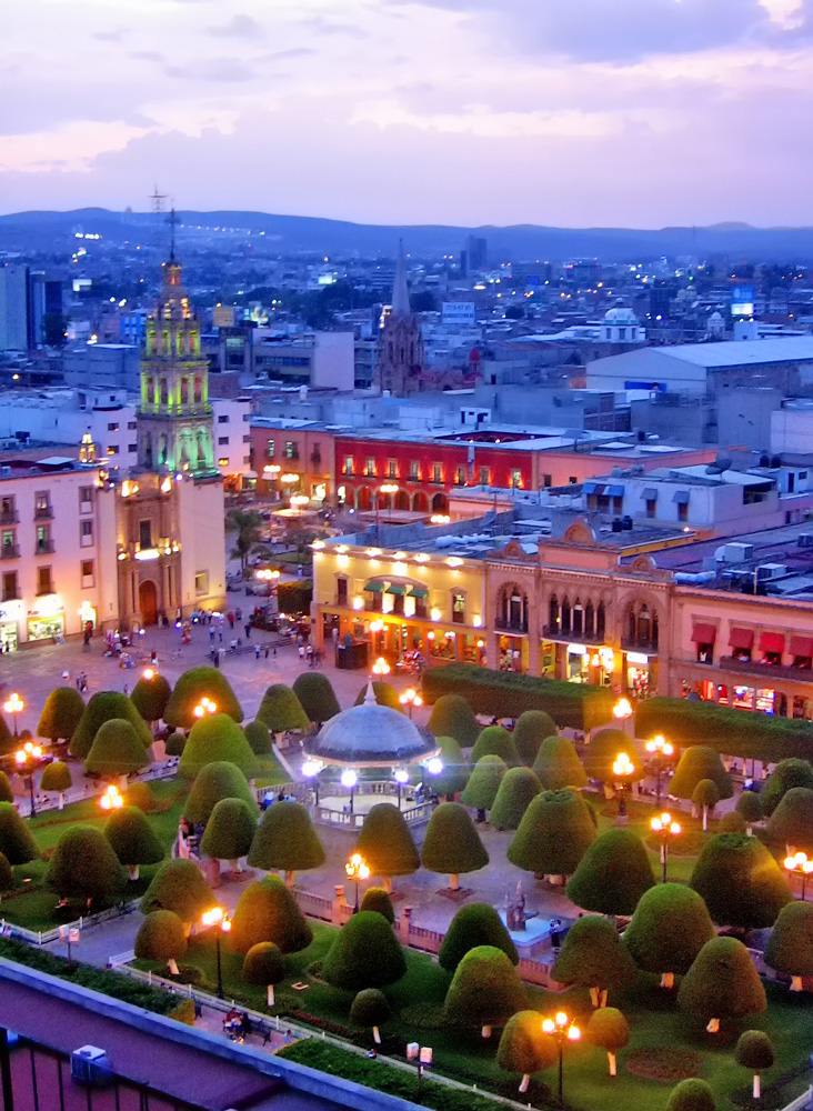 Aérea de la Plaza Principal